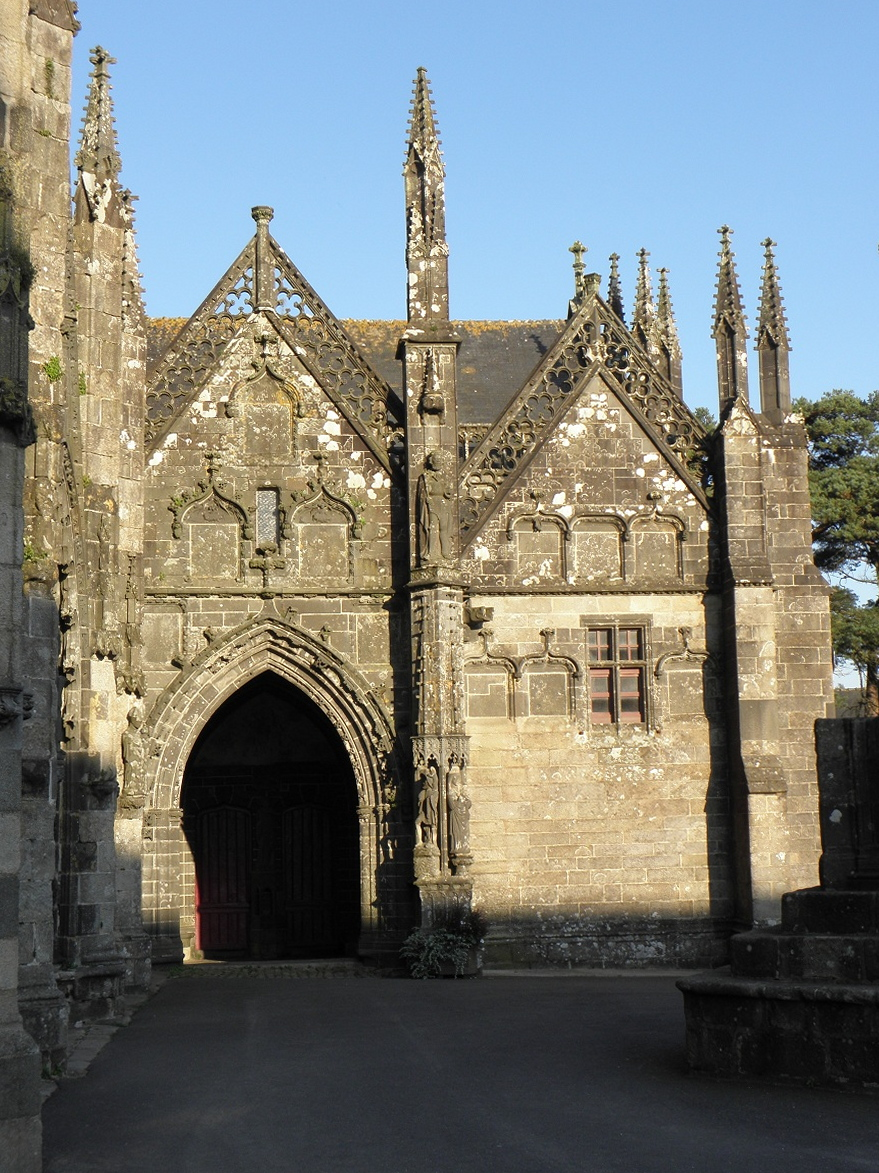 Porche et sacristie du transept méridional de la basilique notre-Dame du Folgoët (29).